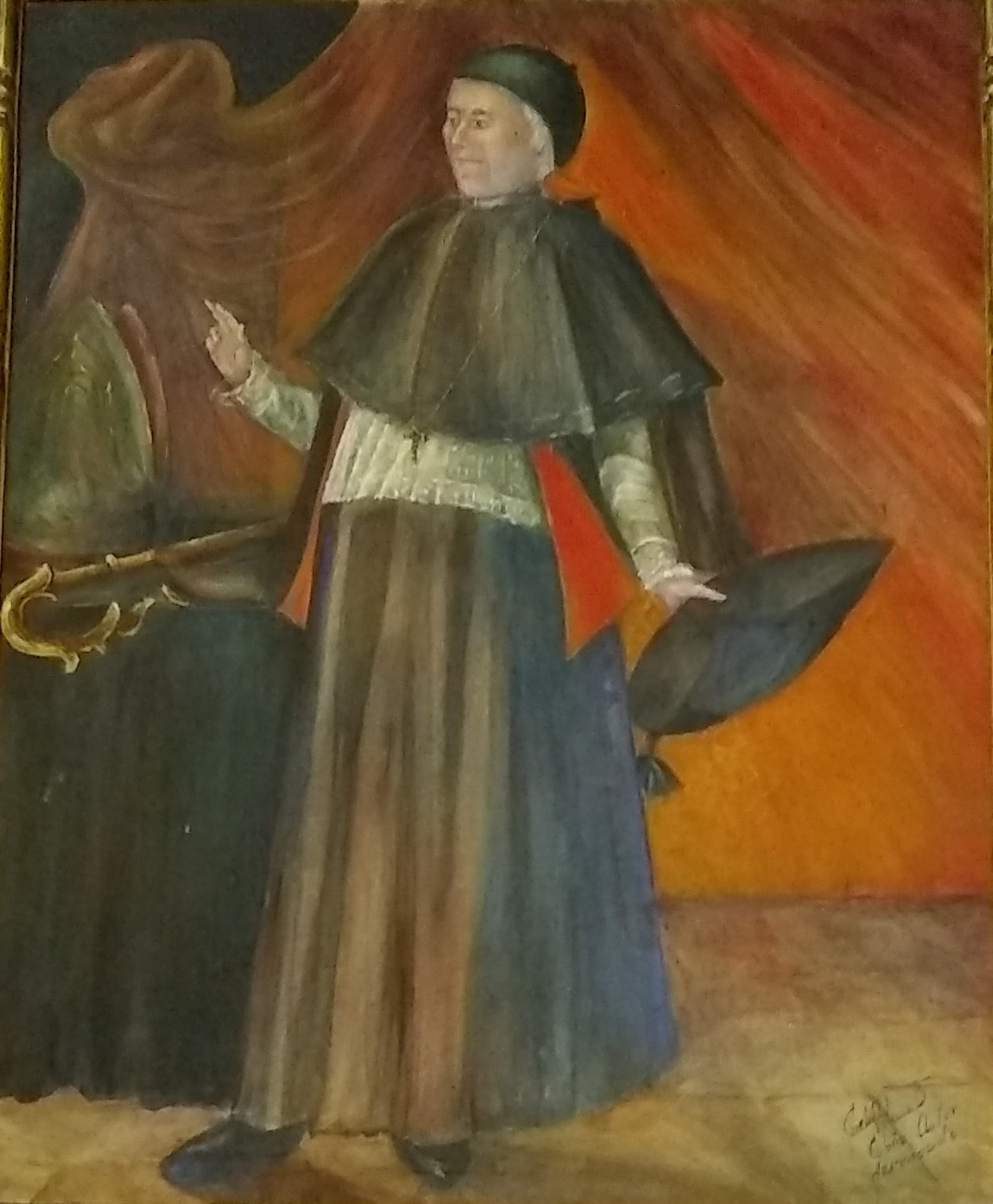 Cuadro de Autor desconocido del Obispo Mariano Martí Estadela. Ubicado en la Casa del Obispo, José Vicente de Una y García, Ciudad de Guanare, Estado Portuguesa, Venezuela.